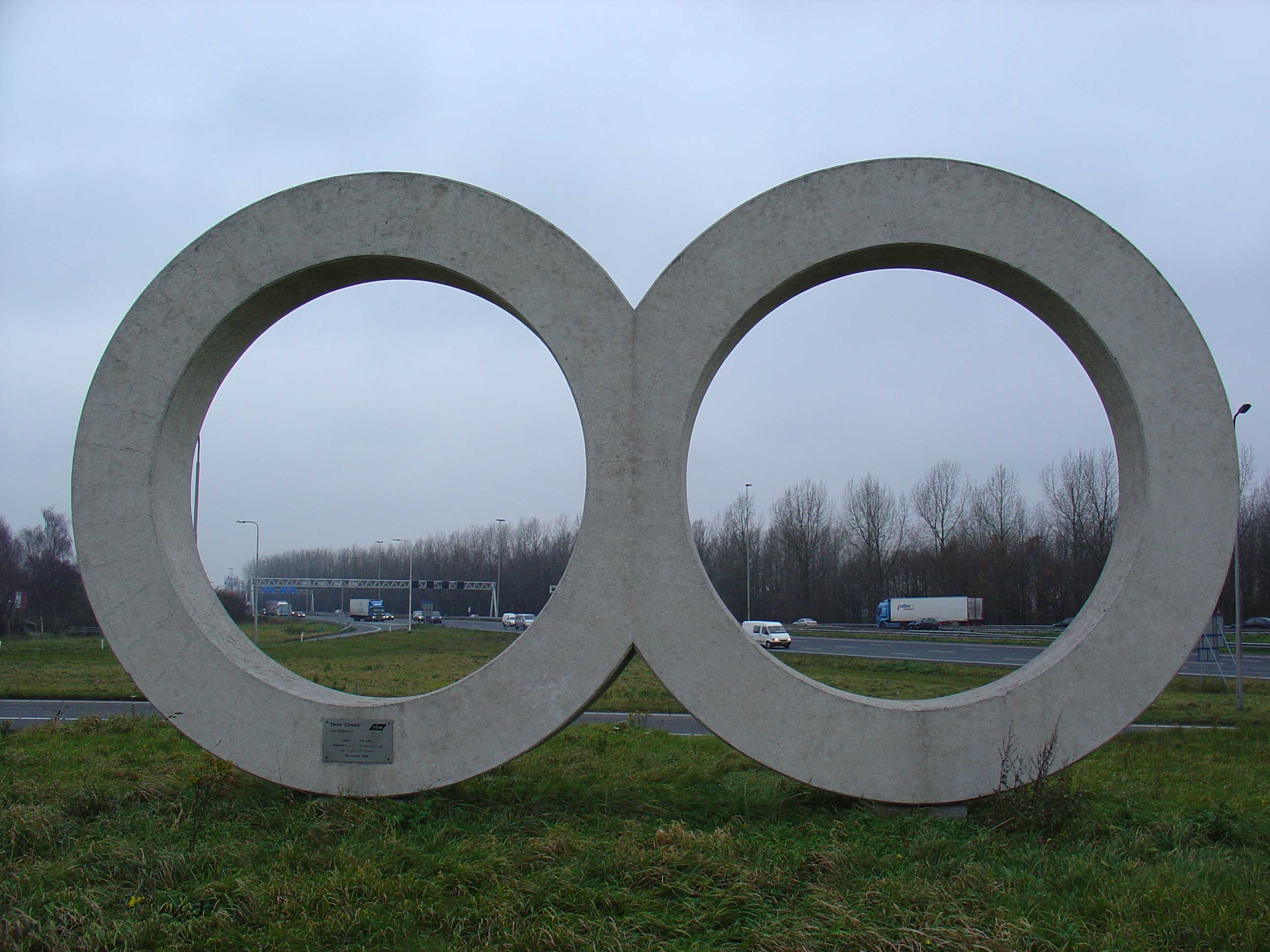 Twee cirkels (beton, 1972) door Ad Dekkers langs de A12 Gouda